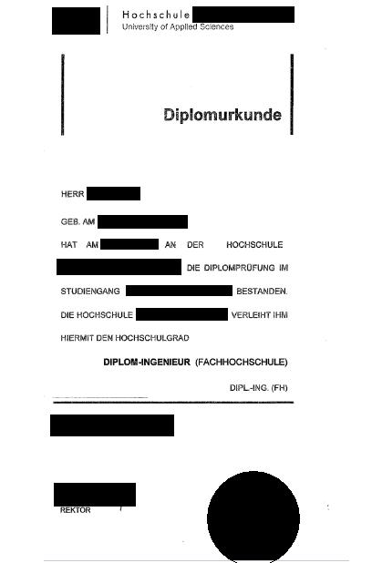 Fachhochschul-Diplom